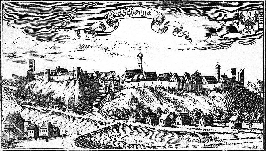 Schongau von Osten her über den Lech gesehen. Stich aus dem Churbaierischen Atlas von 1687